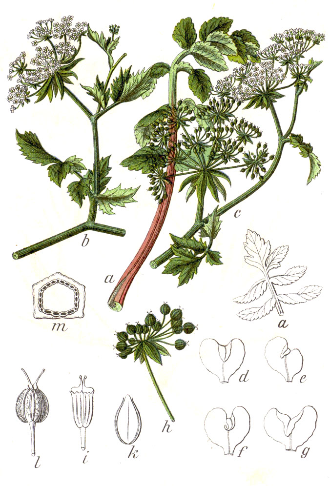 Berula erecta (Huds.) Coville, syn. Sium angustifolium L. Original Caption Gemeine Berle, Sium angustifolium